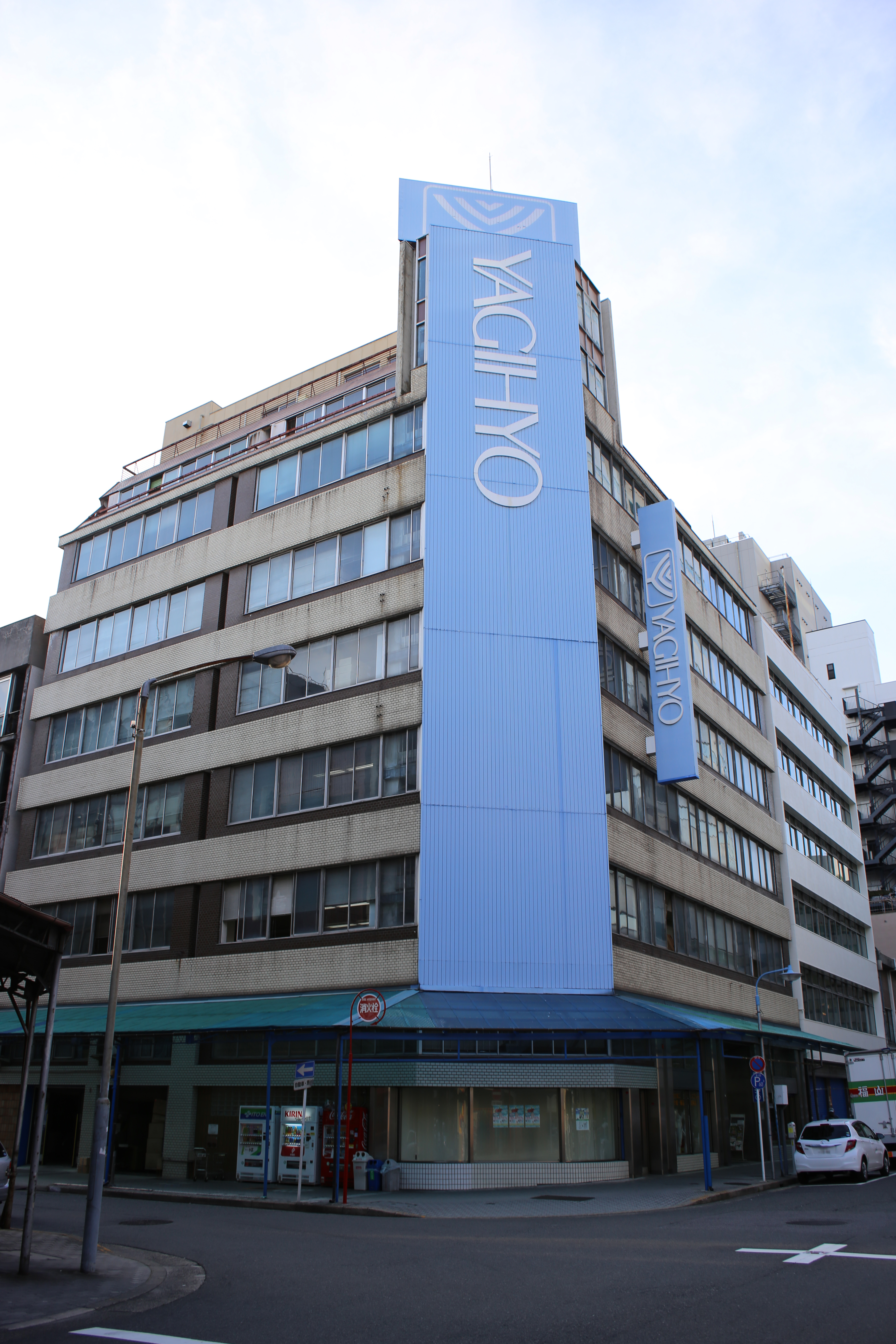 名古屋市中区錦二丁目の八木兵本社を東側公道南側より撮影。ただし、ナンバープレートにつき画像処理済み。